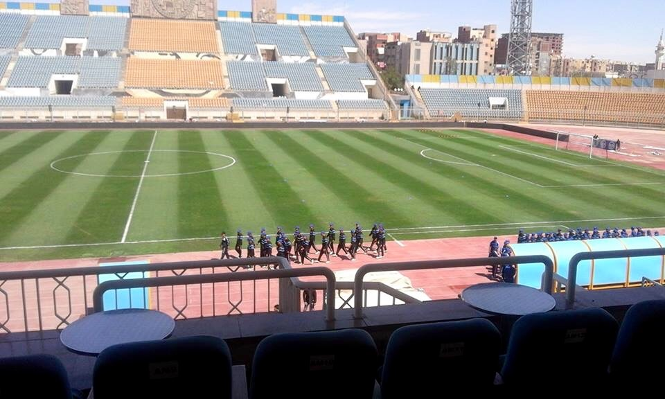 Estadio ubicado en Ismailia